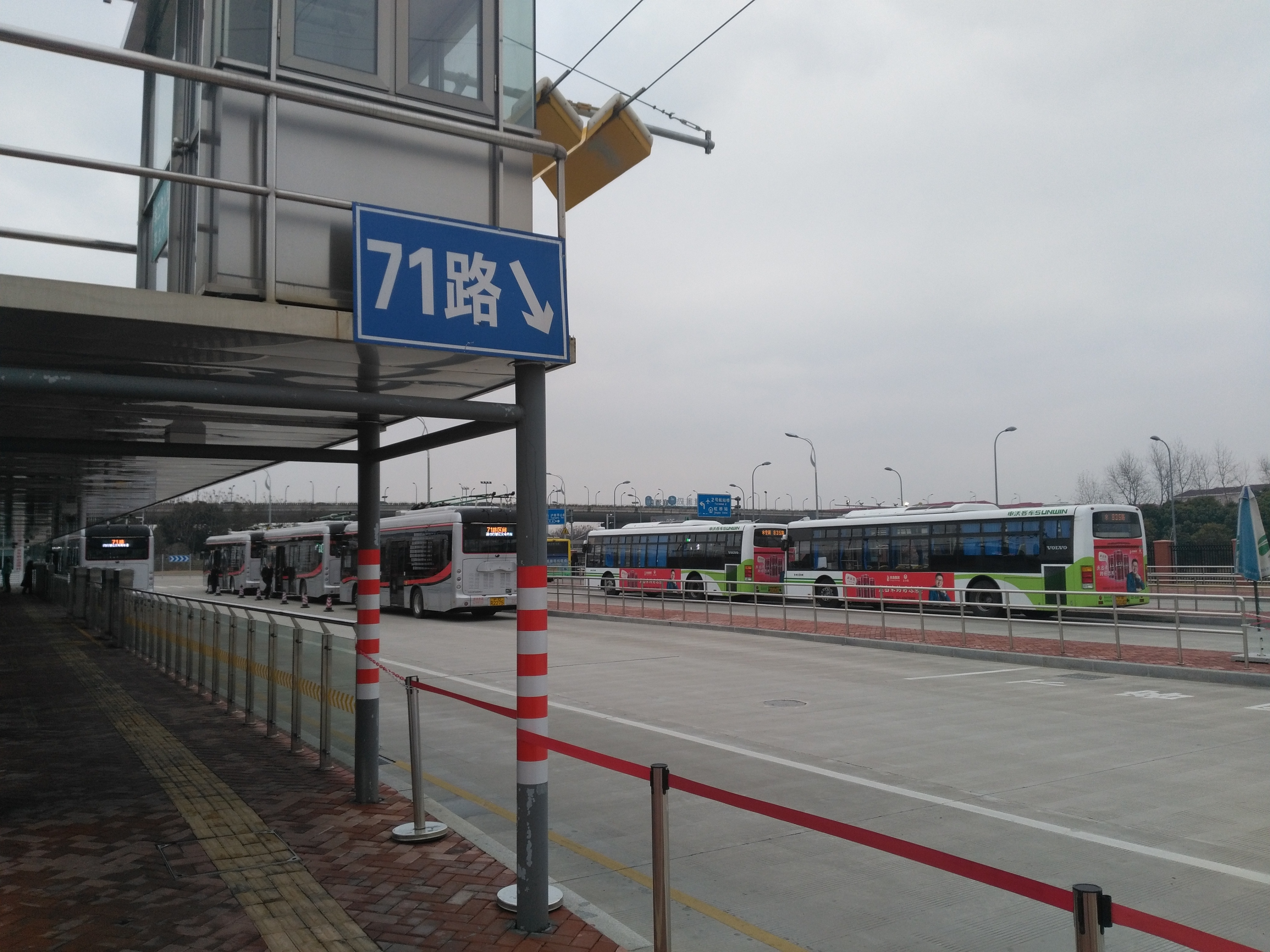 上海公交71路申昆路站台